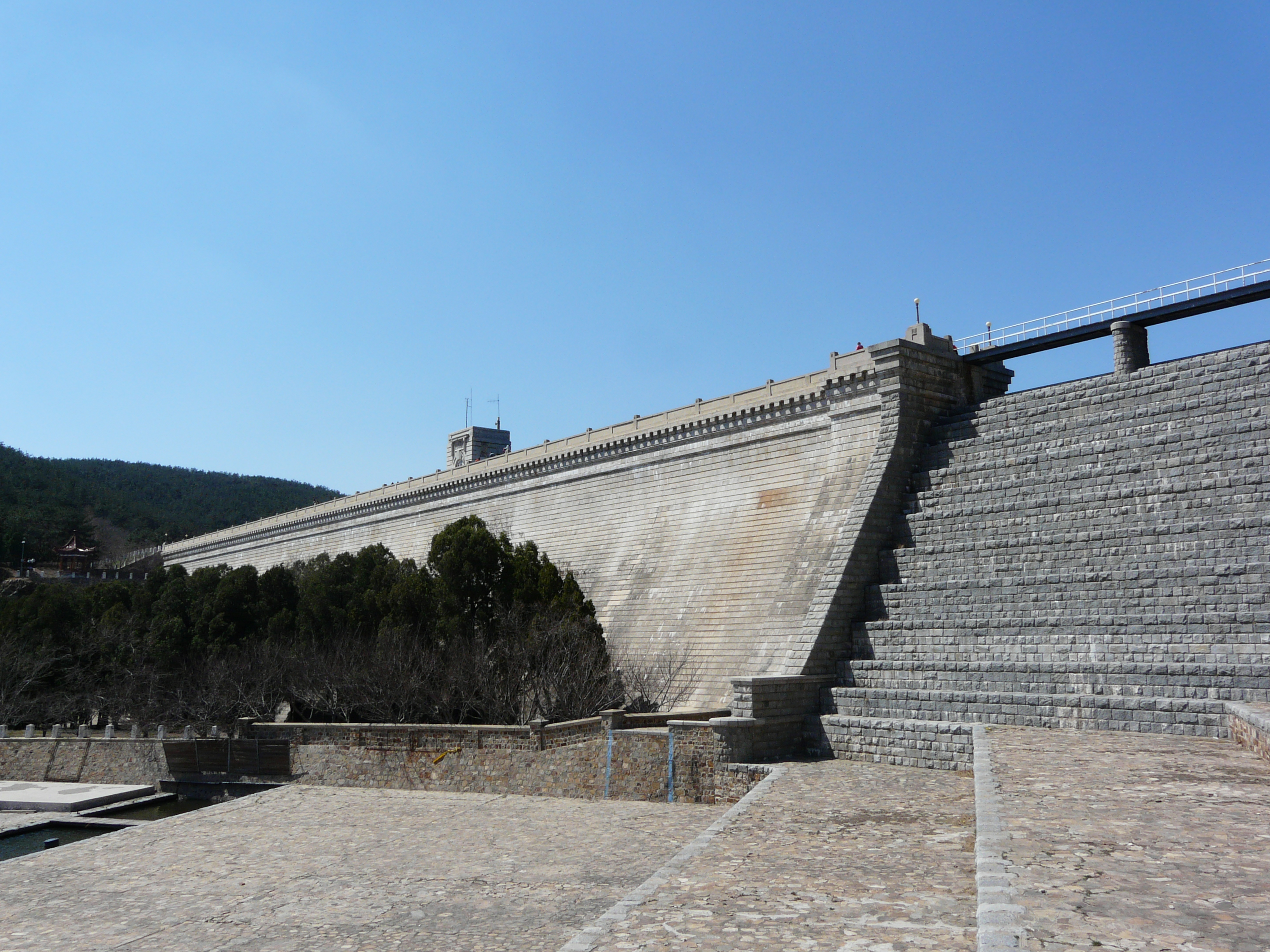 龍王塘水庫